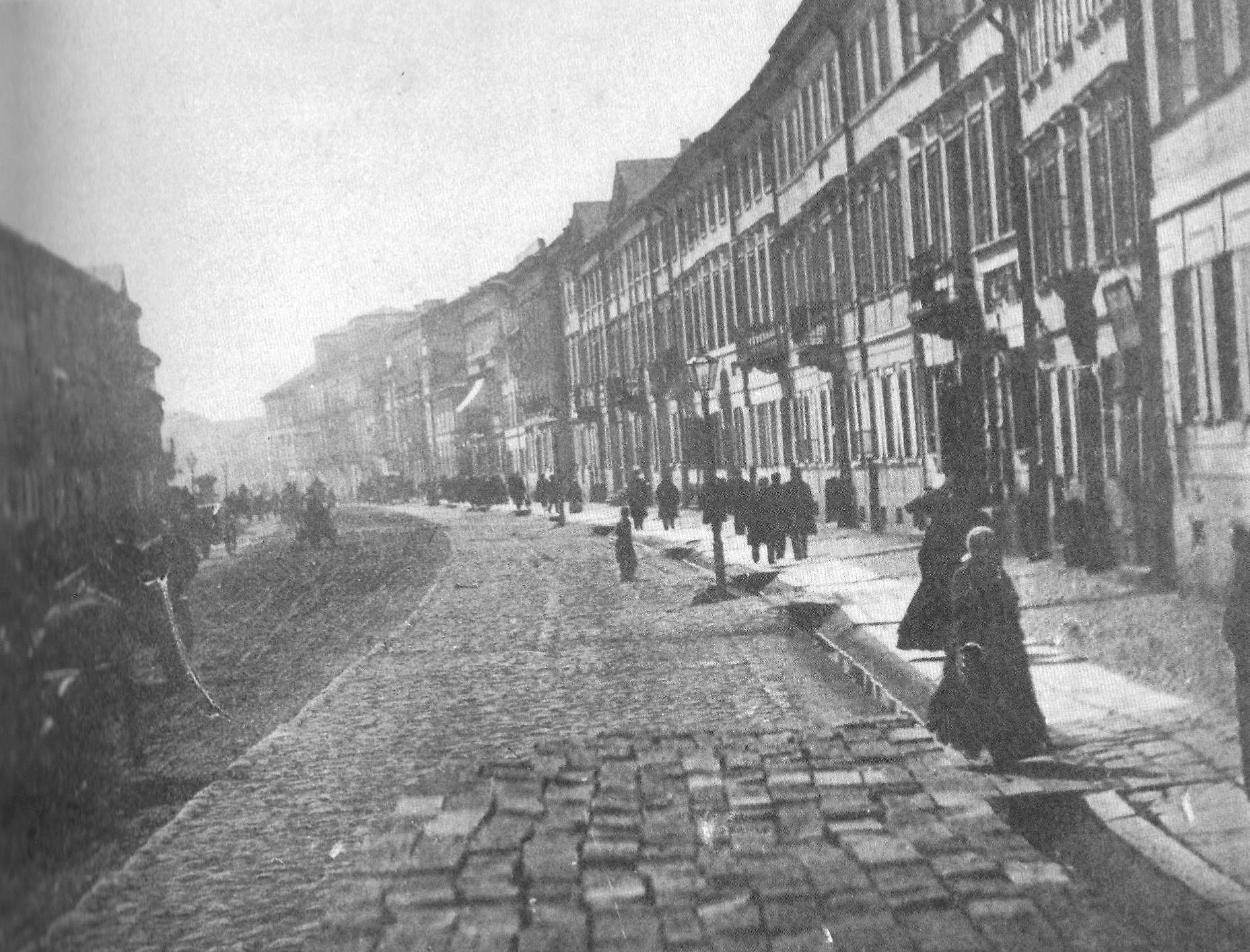 Ulica Nowy Swiat w Warszawie w II połowie XIX wieku